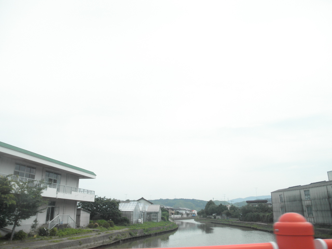 徳島県小松島市立江町松本 立江川